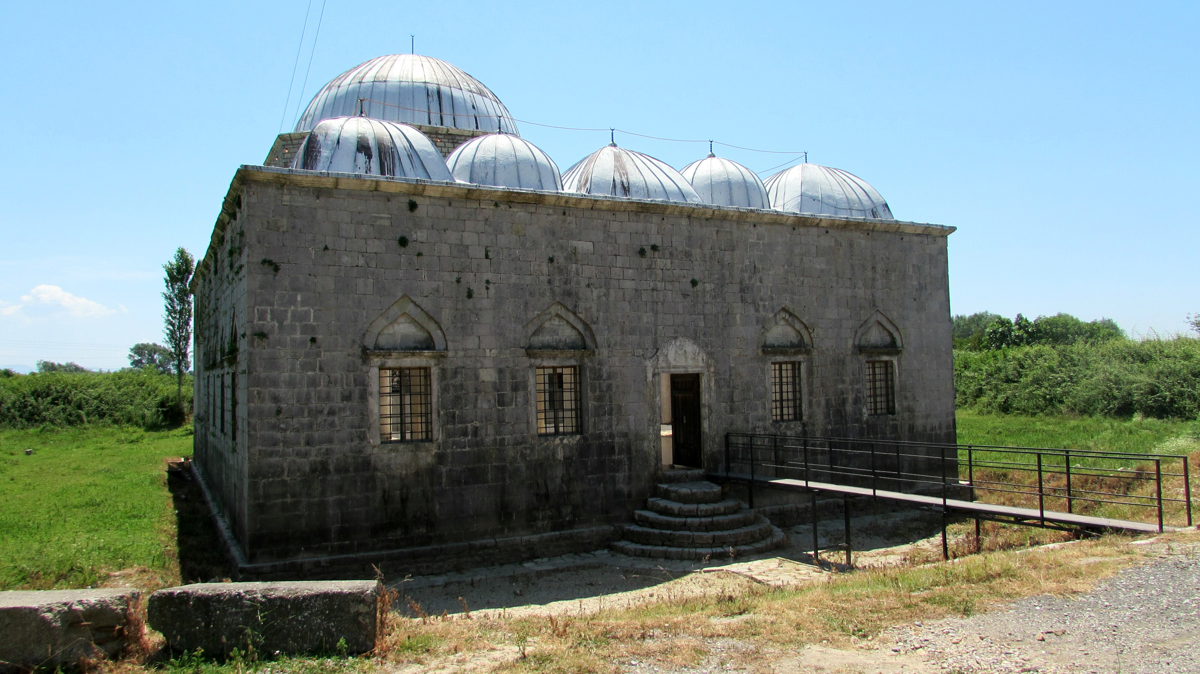 ShkodraBleimoschee2014